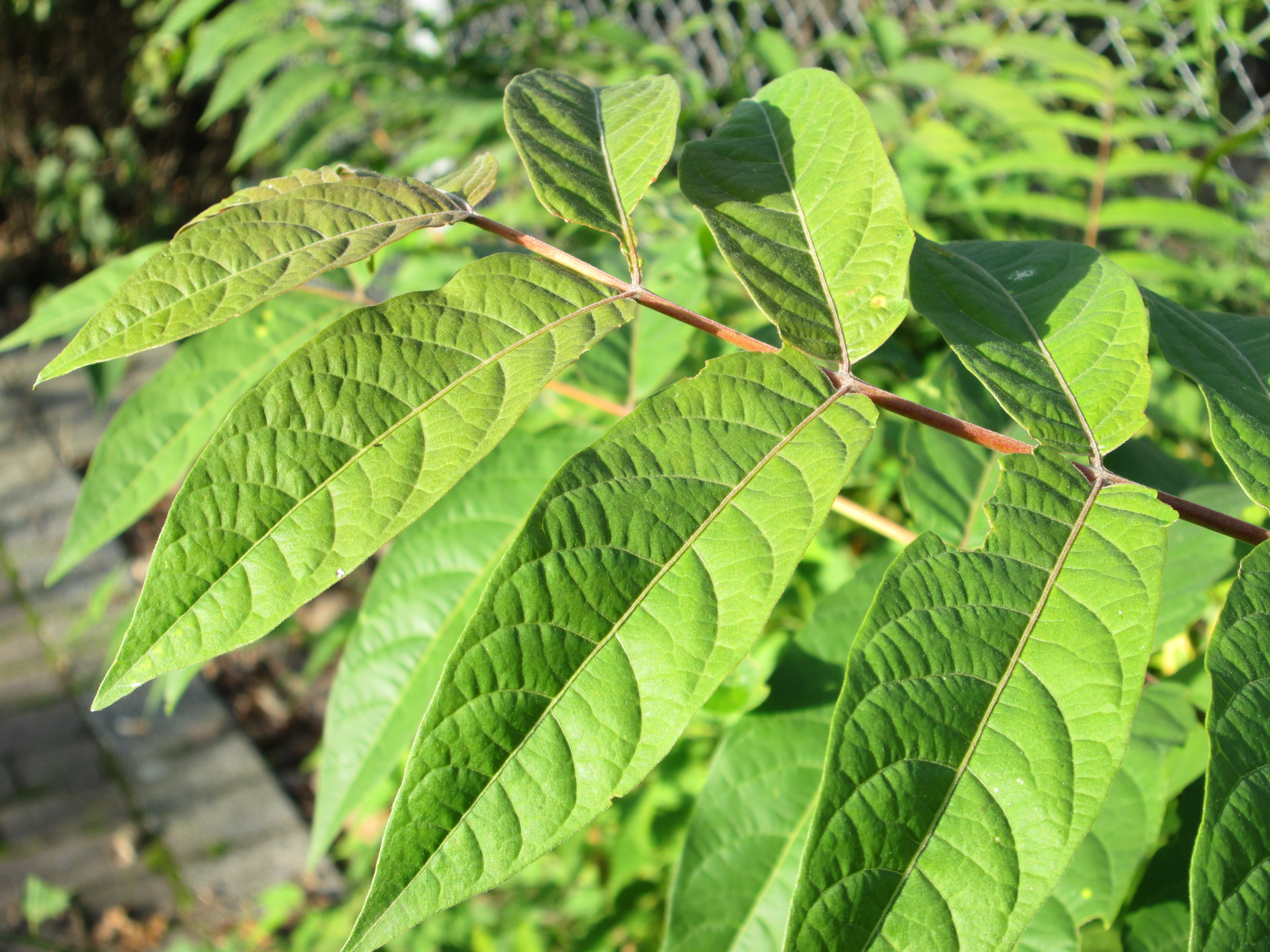 Götterbaum (Ailanthus altissima) in Hockenheim